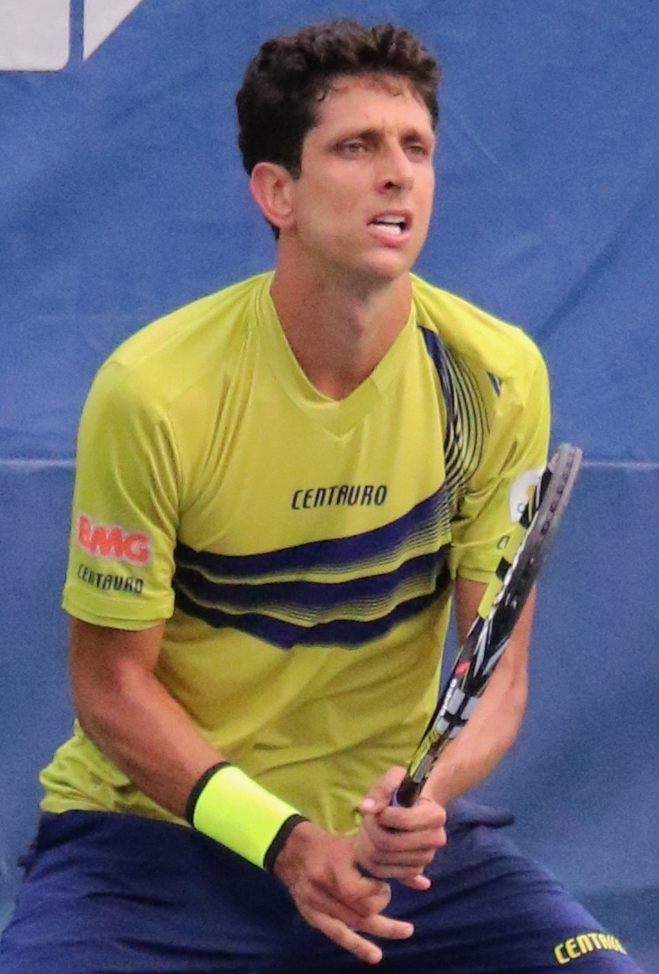 Melo US16 (10)